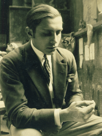 Le sculpteur français Victor Nicolas à l'Ecole nationale supérieure des beaux-arts de Paris en mars 1927